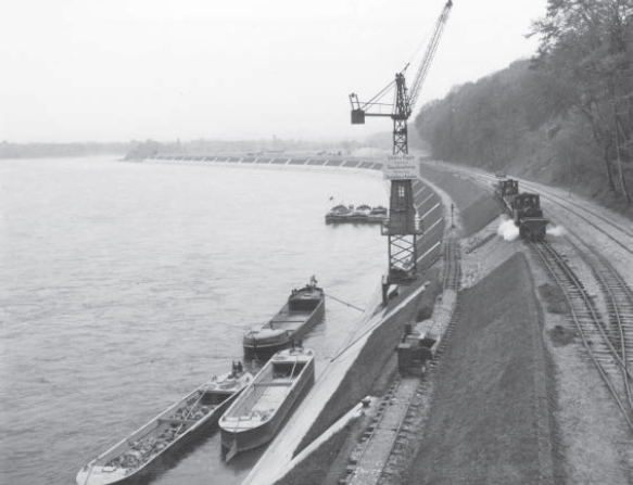 Hafenbahnhof Birsfelden im Bau